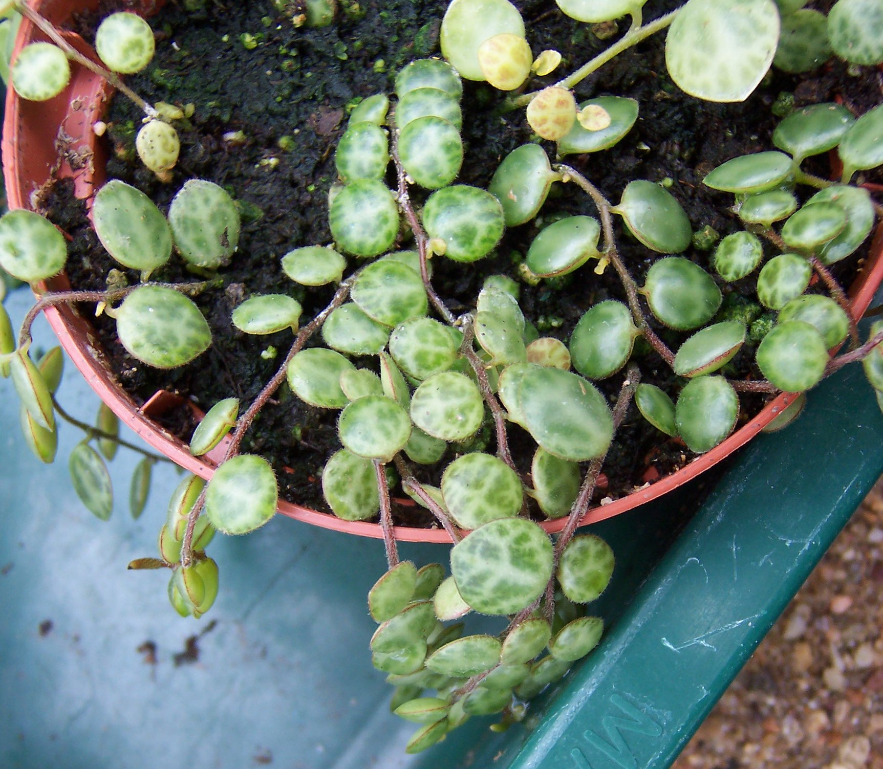 Peperomia prostrata, habitus